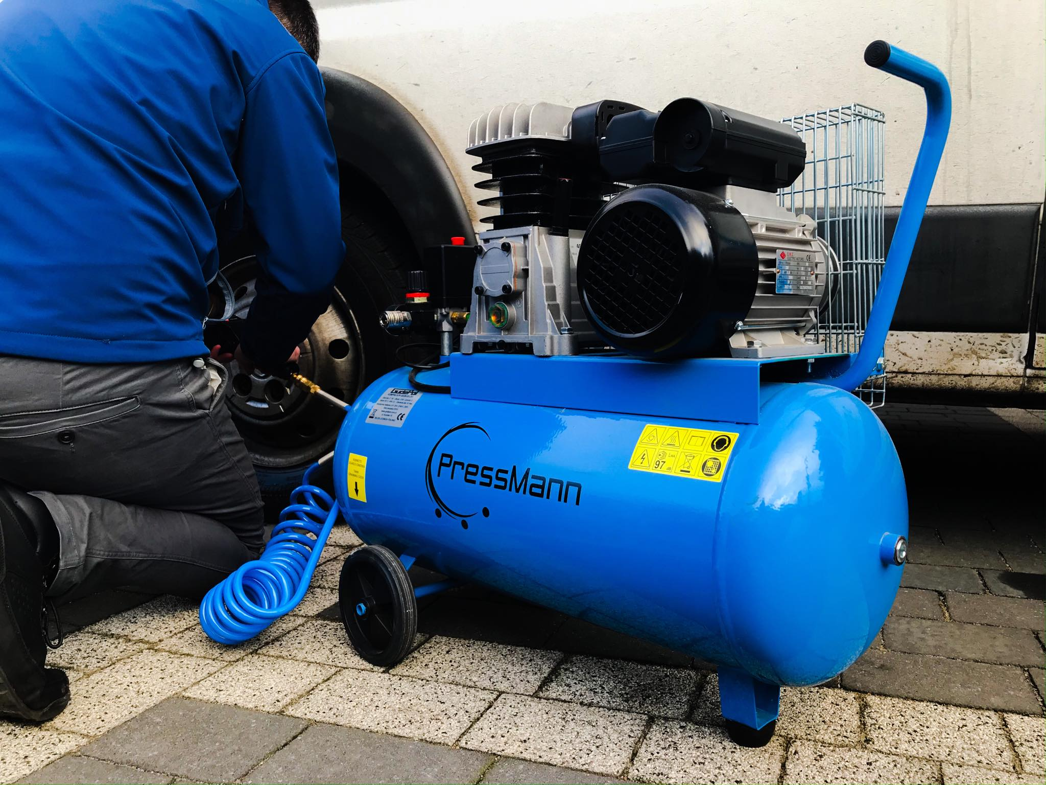 Sprężarka tłokowa olejowa - najpopularniejszy typ sprężarki